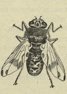 Horse botfly, Gasterophilus intestinalis Keywords: Oestridae, Botfly nl: Horzel Trefwoorden: Oestridae, Horzel de: Dasselfliege